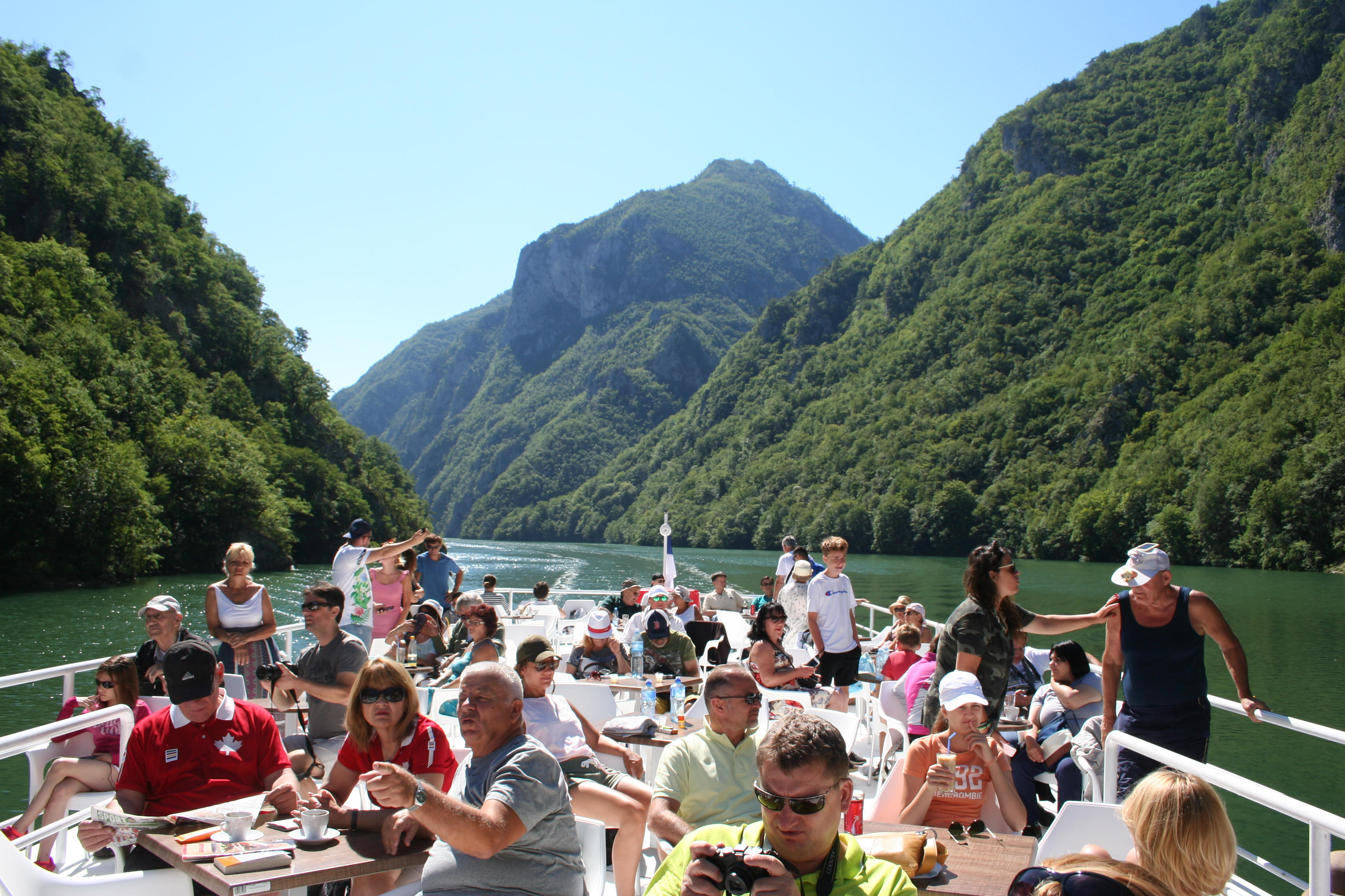 Krstarenje Drinom brodom Grizzly 2, Perućac-Višegrad